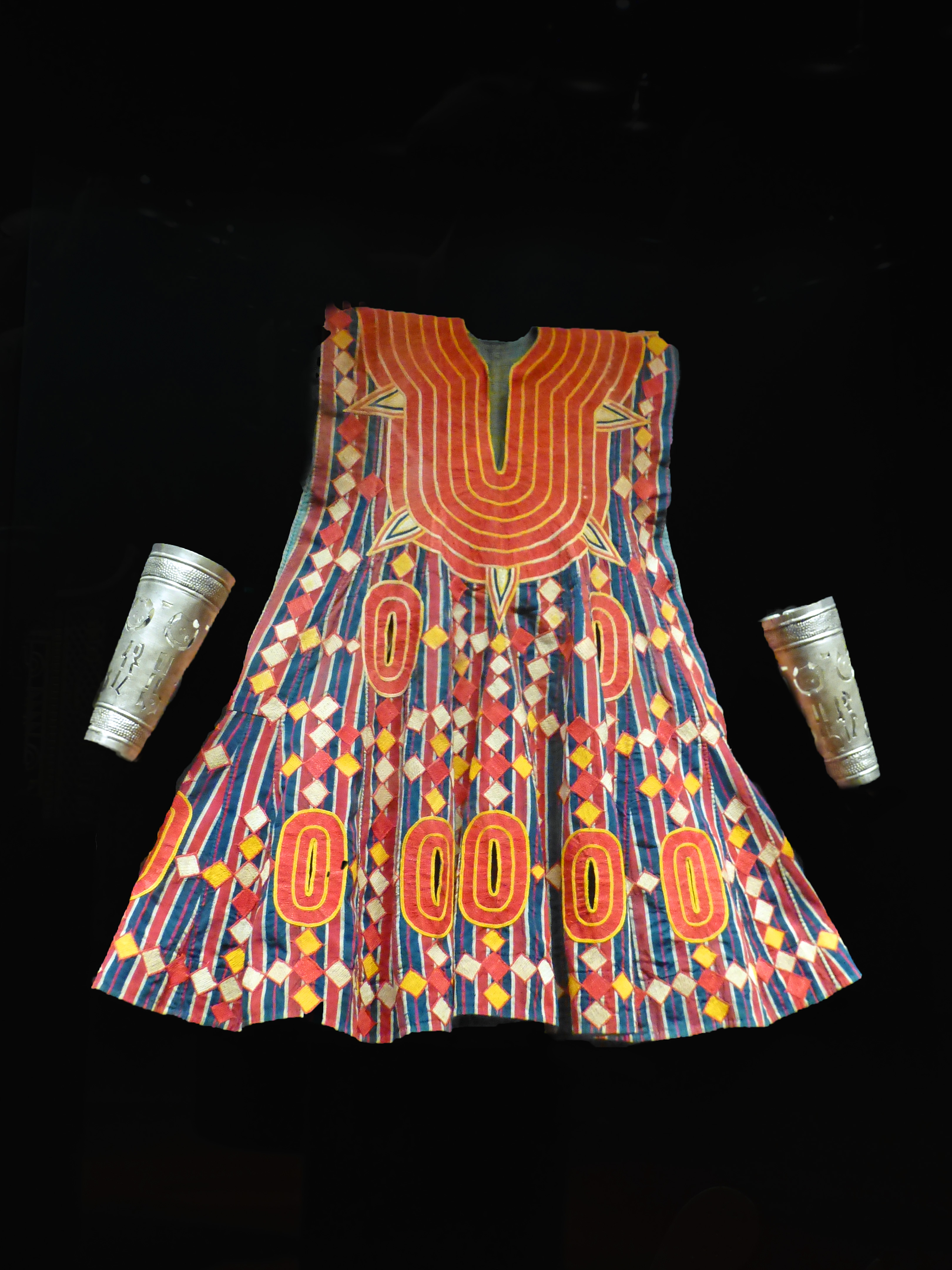 Tunique de parade kansawu Fon, Bénin Coton local, armure : toile rayée et broderie 19e siècle Donateur : Bernard Maupoil Musée du quai Branly, n° 71.1936.21.103 Paire de bracelets ma-wu-alo Fon Abomey, Bénin Argent 19e siècle Donateur : Bernard Maupoil Musée du quai Branly, n° 71.1936.21.36 1-2